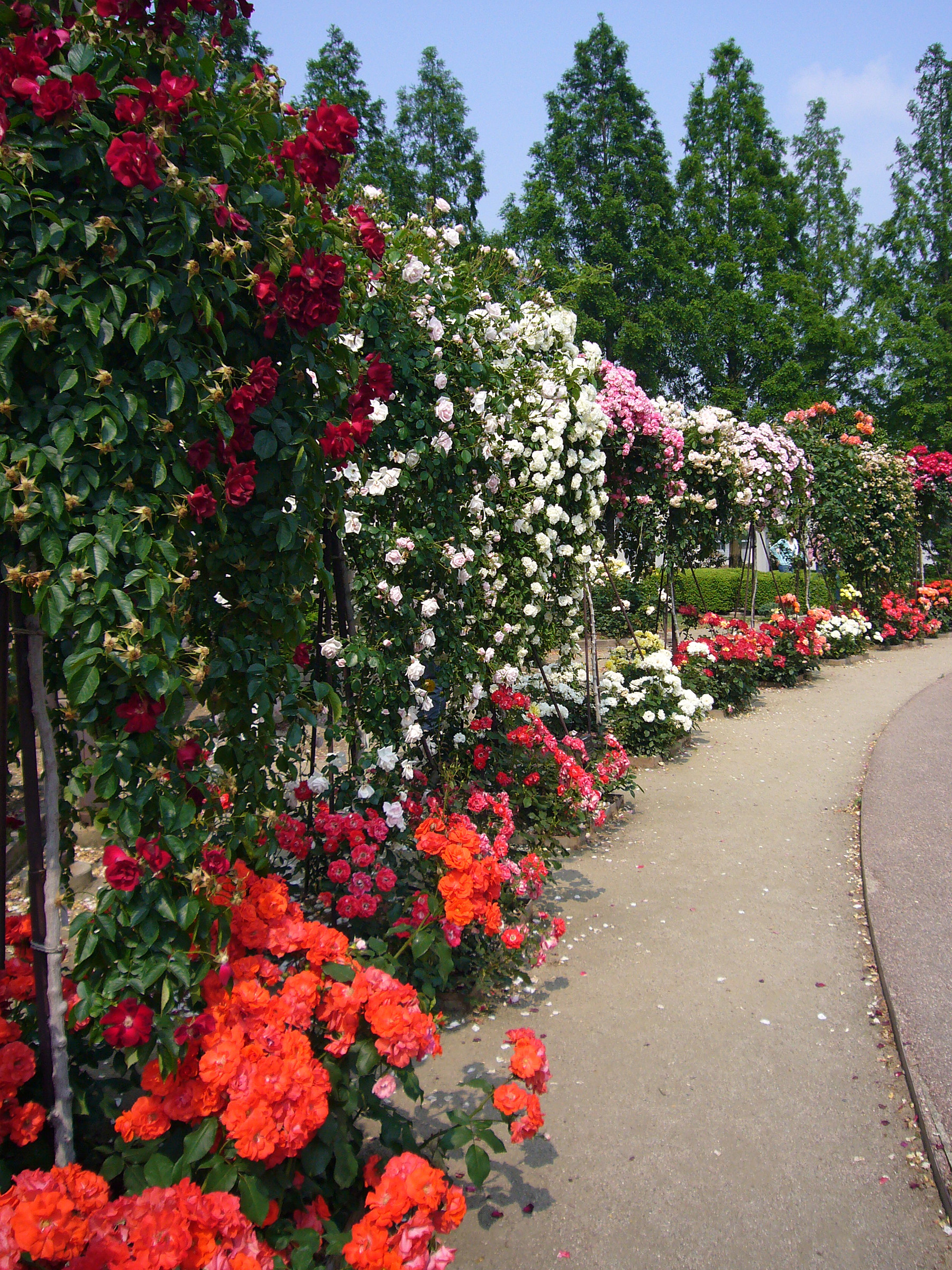 Aramaki rose park in Itami, Hyogo prefecture, Japan